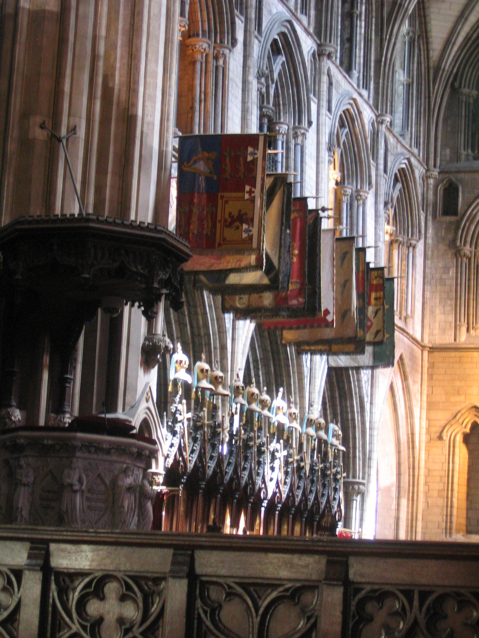 estendards a l'església de st. Patrick, e Dublin